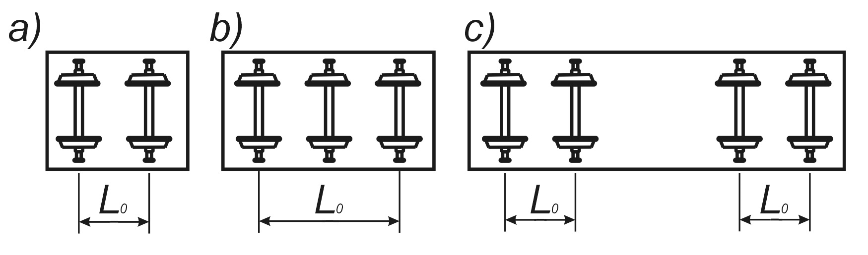 Vagonu riteņu shēmas: a) divasu, b) trīsasu, c) četrasu